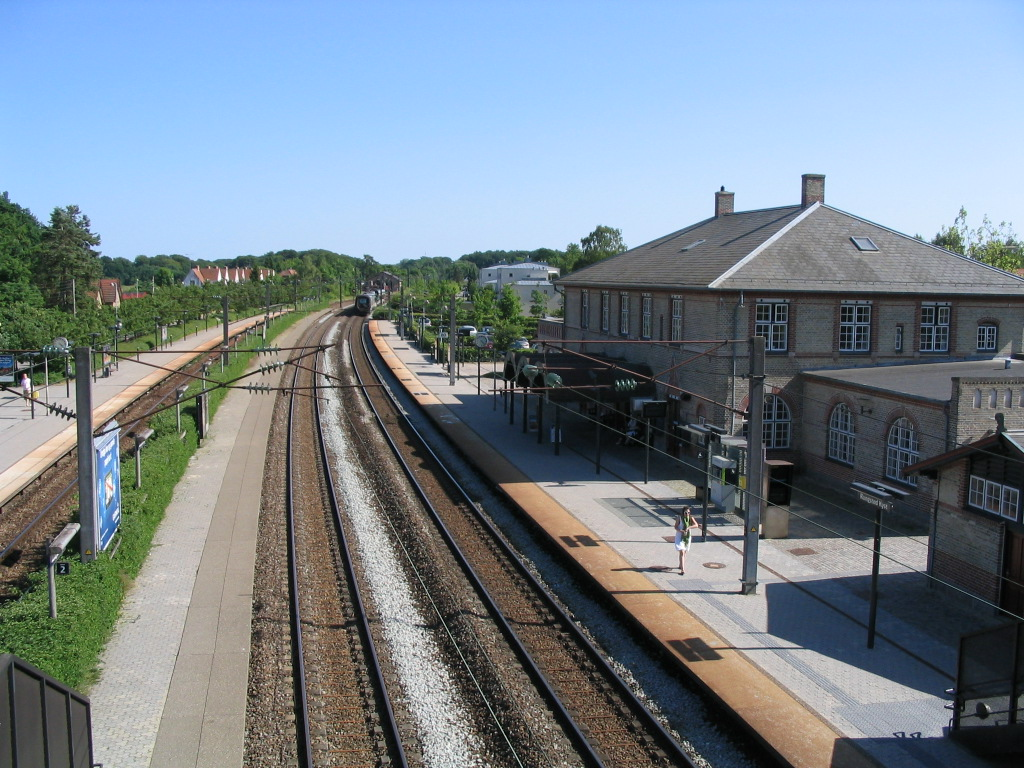 Rungsted Stasjon